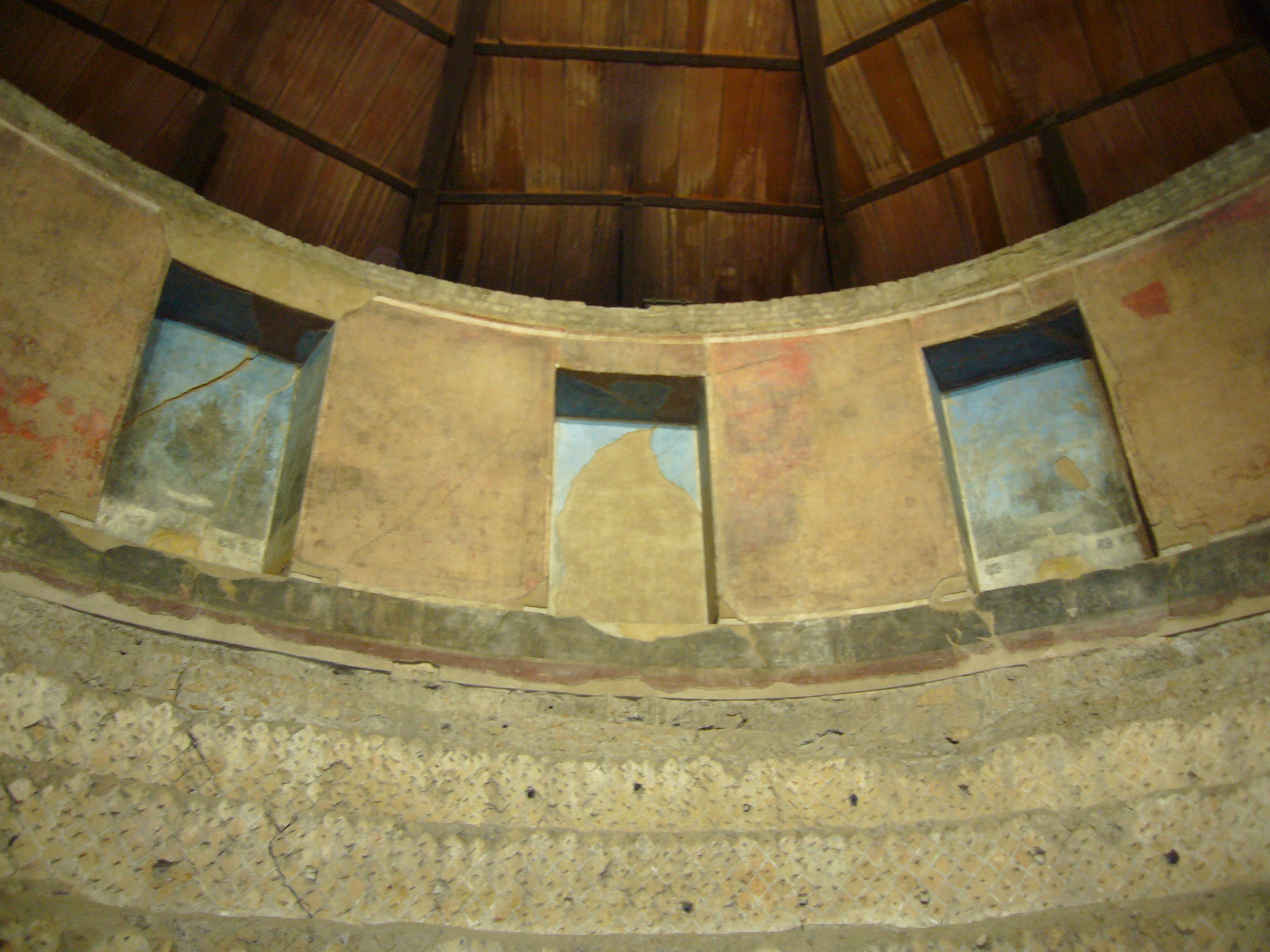 Roma, Auditorium di Mecenate: particolare dell'abside con tracce di pitture di giardino